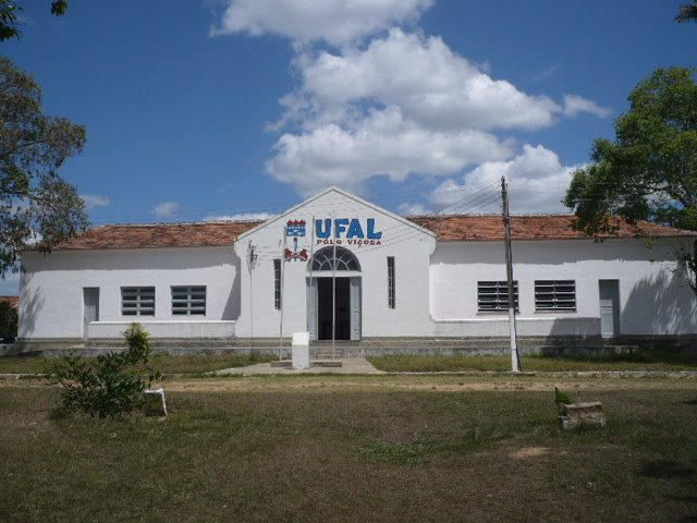 Prédio do Centro de Ciências Agrárias (CECA) da Universidade Federal de Alagoas (Ufal).